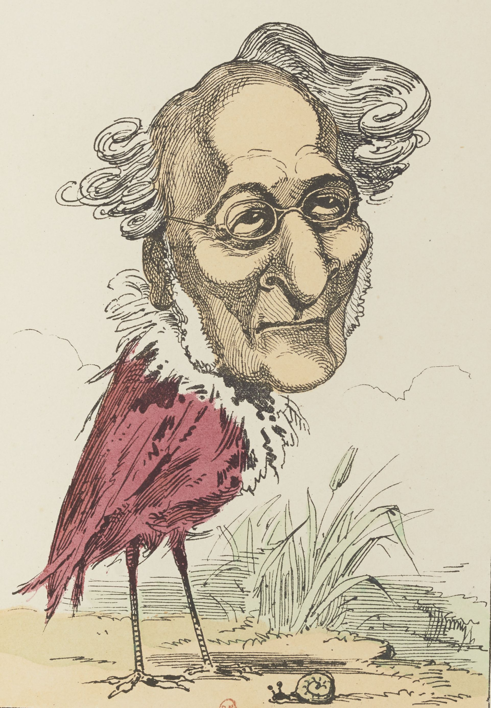 Photo de la caricature du magistrat Prosper ZANGIACOMI (fils de Joseph), issue de "La ménagerie Impériale" - caricature N°17 "L'ibis" - dessinée par Paul Hadol (1835-1875)